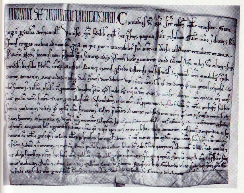 Schmallenberg, 1244, Urkunde des Konrad von Hochstaden